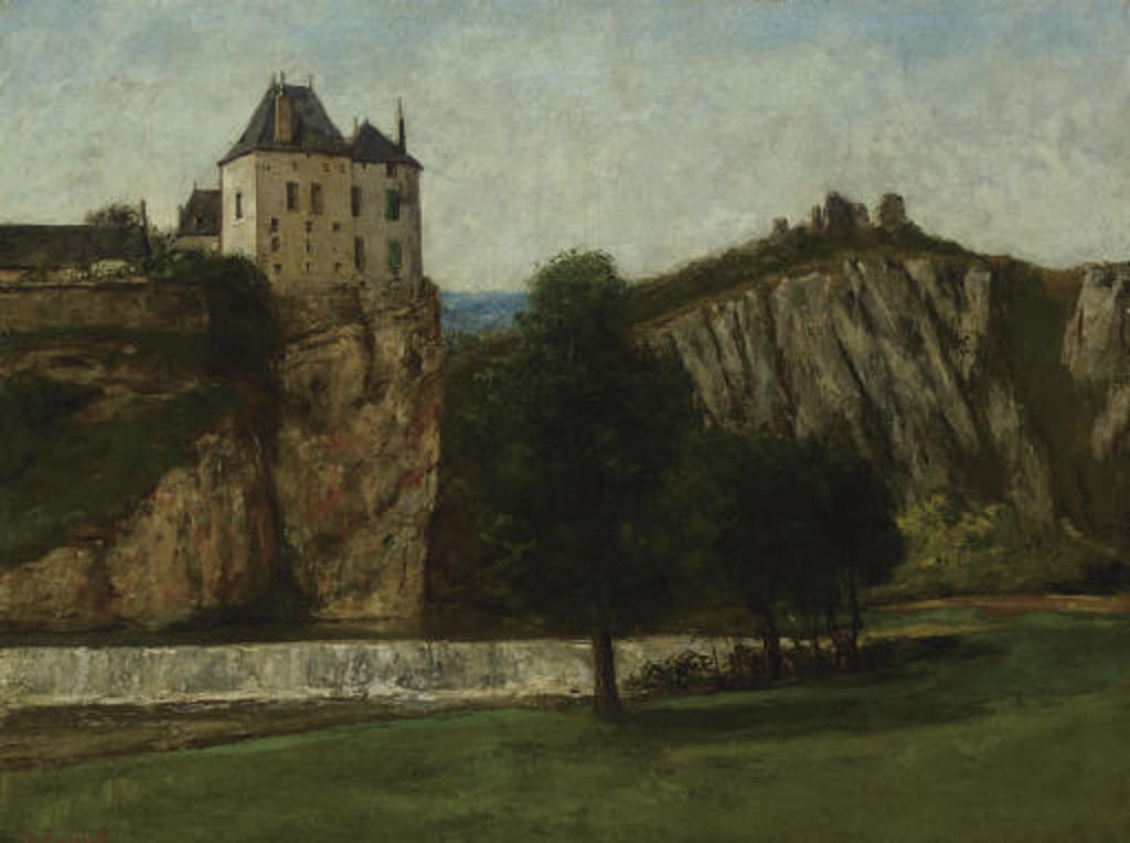 "Le Château de Thoraise" de Gustave Courbet; huile sur toile, 66 x 86.4 cm, 1965.